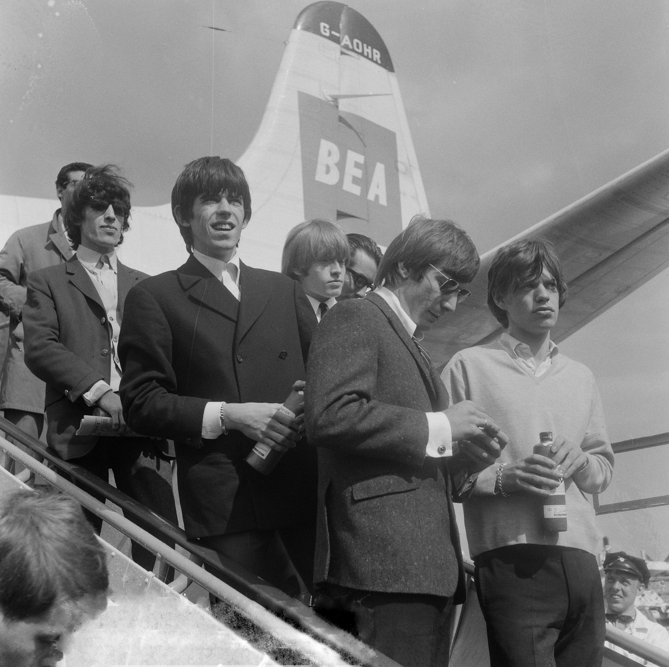 Collectie / Archief : Fotocollectie Anefo Reportage / Serie : [ onbekend ] Beschrijving : Aankomst van de Rolling Stones op Schiphol Datum : 8 augustus 1964 Locatie : Noord-Holland, Schiphol Trefwoorden : aankomsten, muziek, popgroepen, vliegvelden Persoonsnaam : The Rolling Stones Fotograaf : Gelderen, Hugo van / Anefo Auteursrechthebbende : Nationaal Archief Materiaalsoort : Negatief (zwart/wit) Nummer archiefinventaris : bekijk toegang 2.24.01.03 Bestanddeelnummer : 916-7420